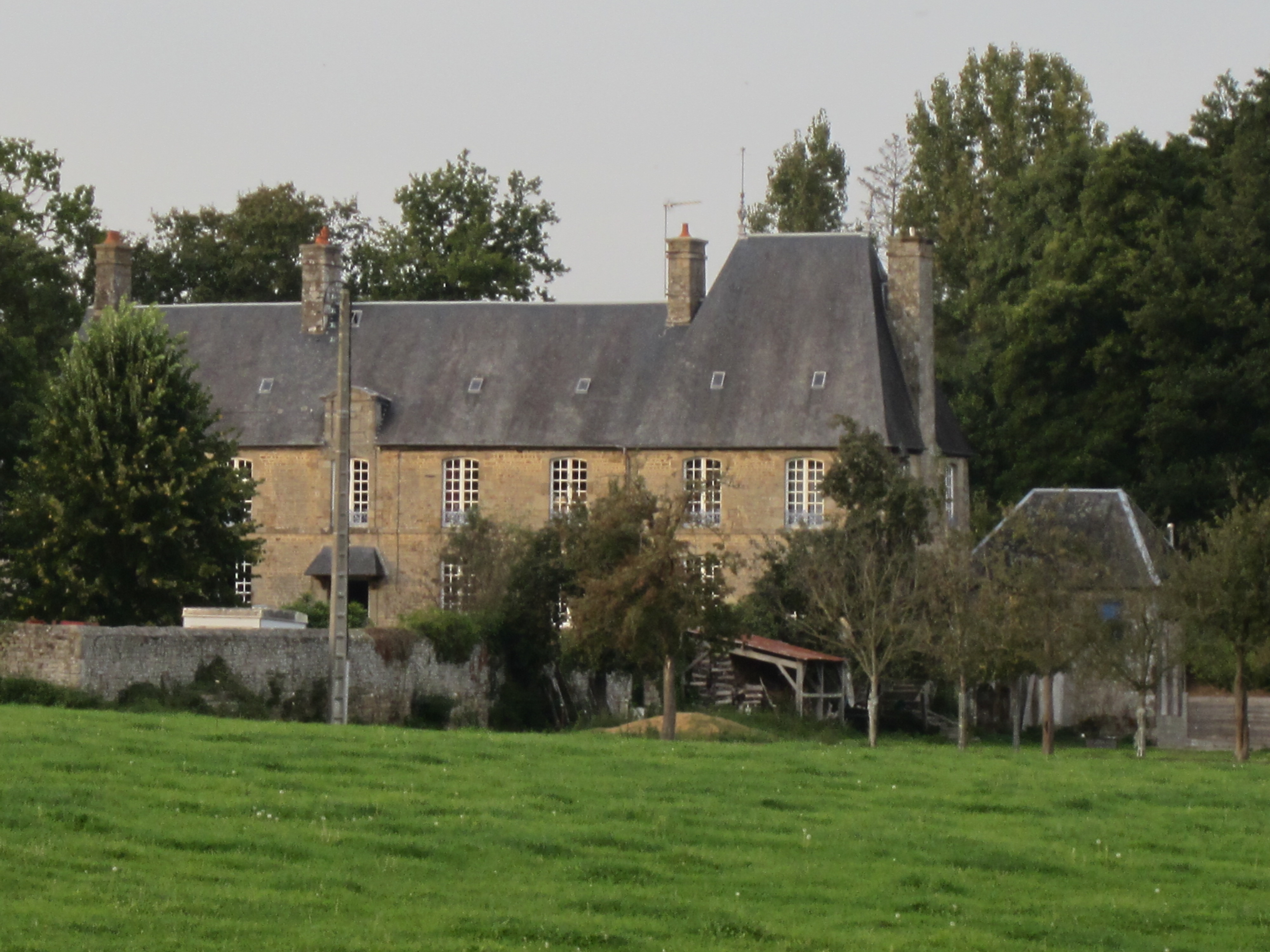 Saint-Cyr-du-Bailleul, Manche